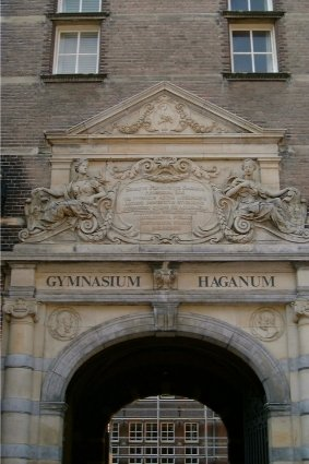 De ingang van het Gymnasium Haganum, het gebouw anno 2005. Vrijgegeven onder GFDL, zie kloeg.txt in de kluis.